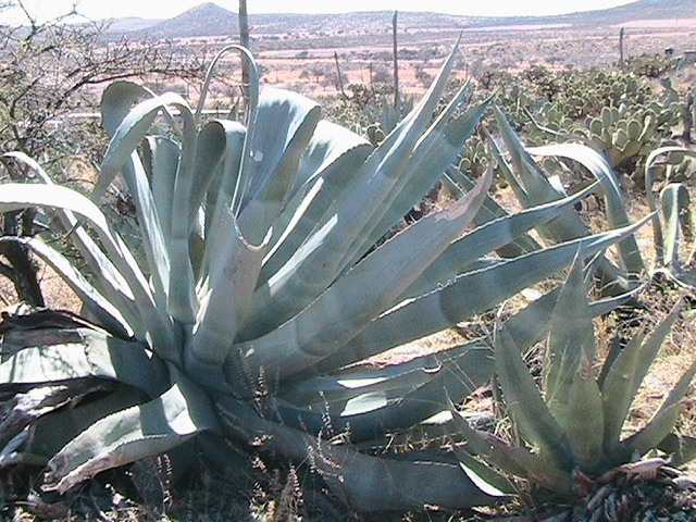 Paisaje de la vegetación en Zacatecas. Tomada en las afueras de Ojitos, Zacatecas, Mexico.